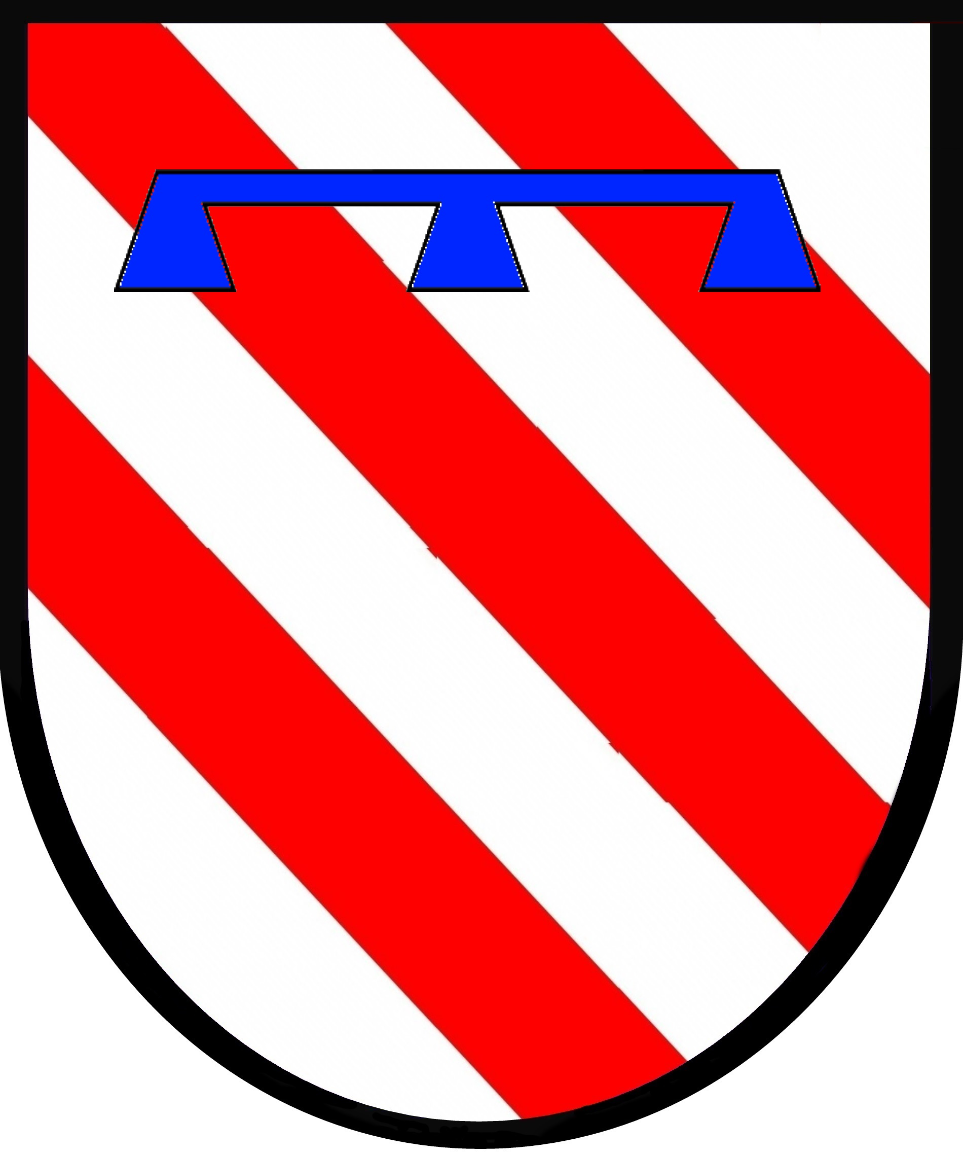 Wappen derer von Reifenberg In Silber drei rote Schrägbalken, oben blauer Turnierkragen